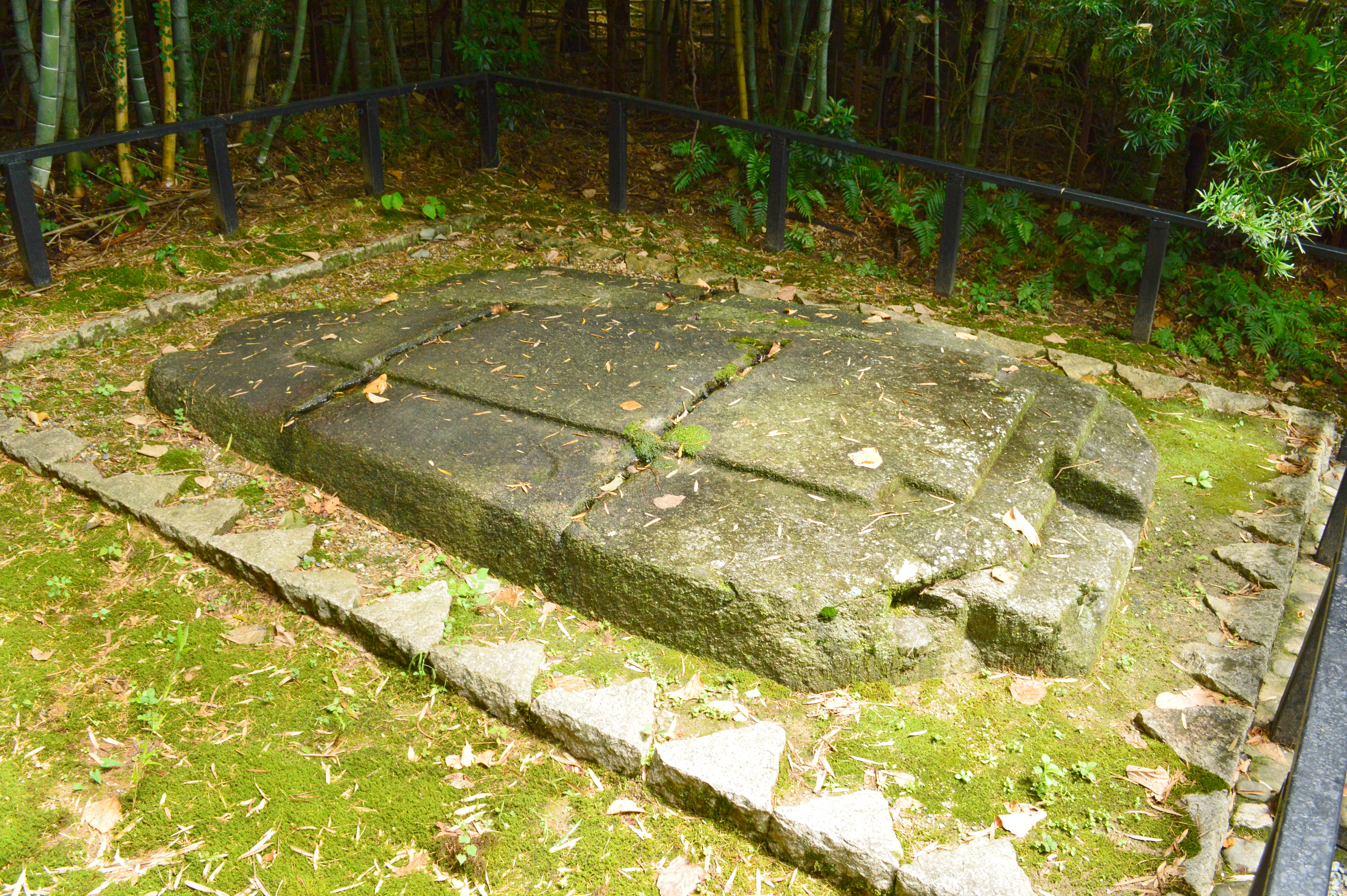 鬼の爼 全景